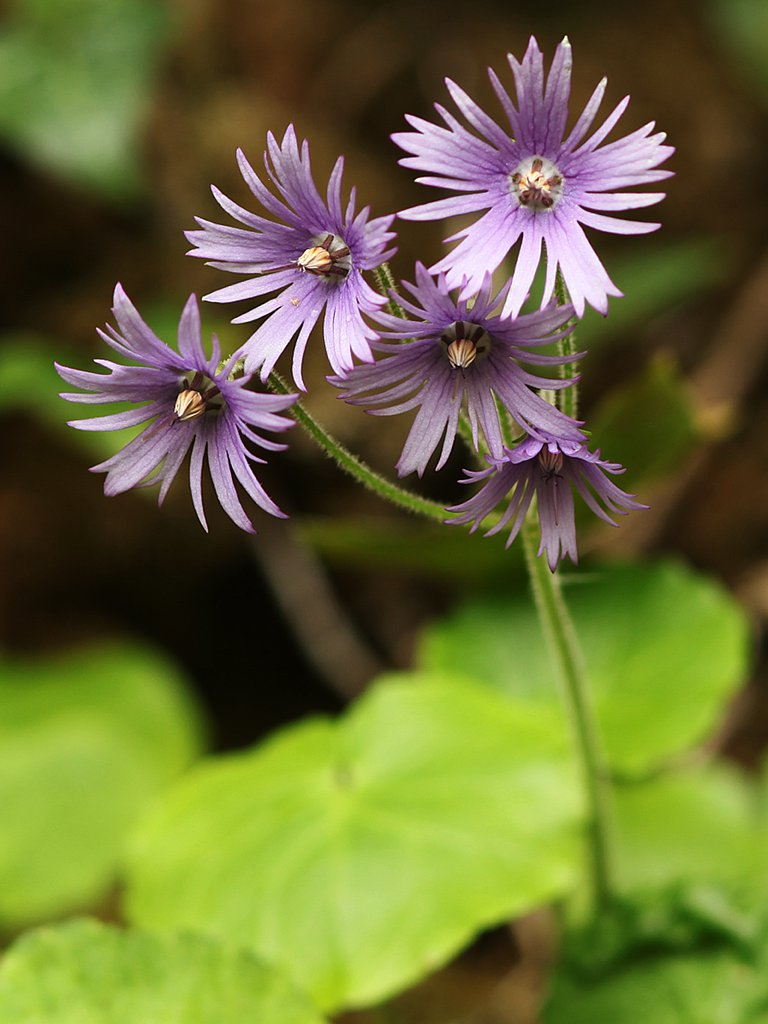 Soldanella villosa, Itxassou, France